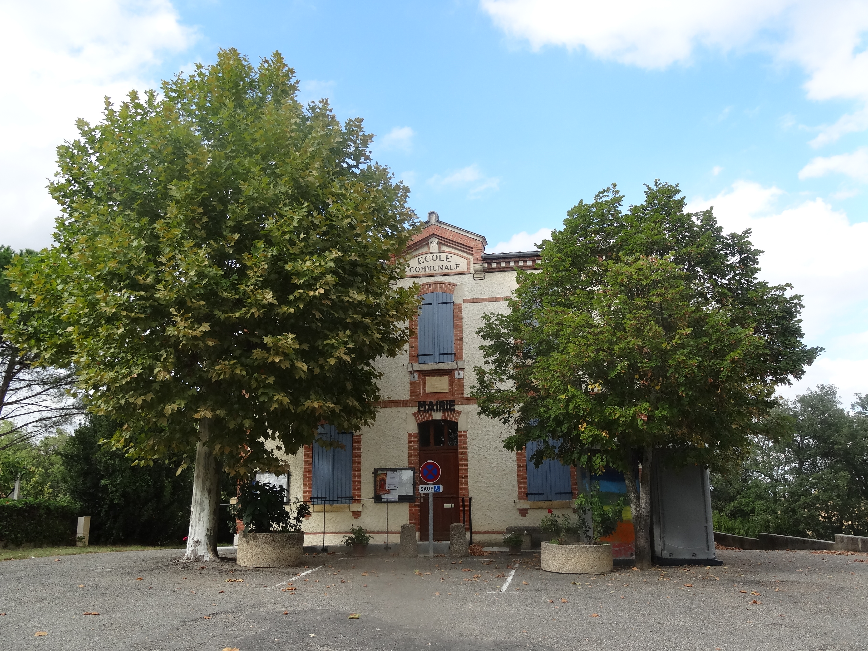 Mairie et ancienne école de Juilles.